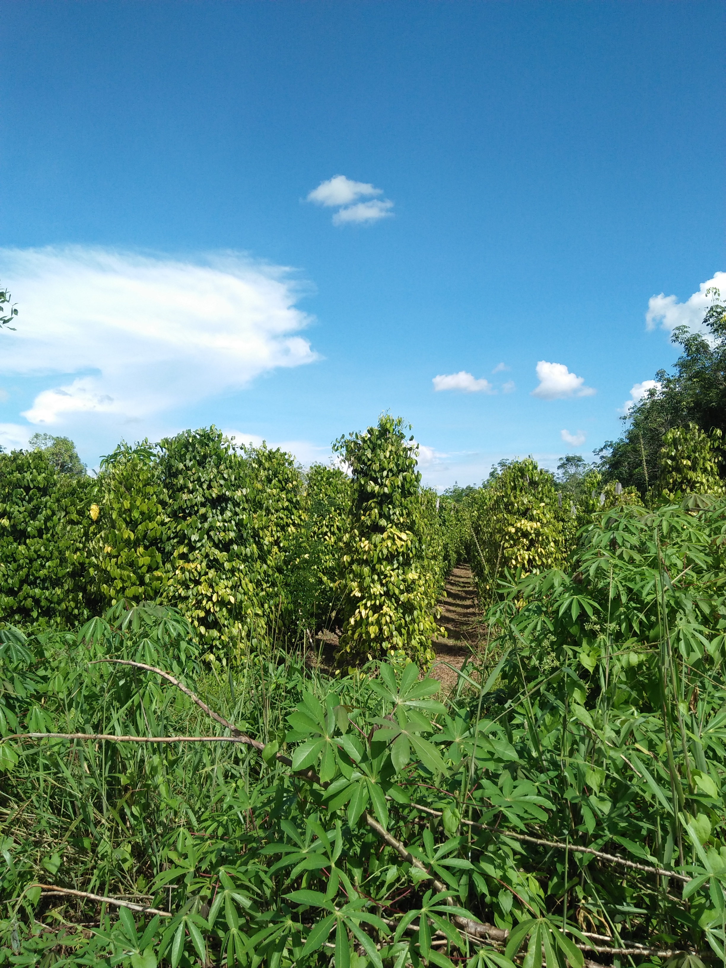 Lada dari daerah Sekuduk, Sejangkung, Sambas.